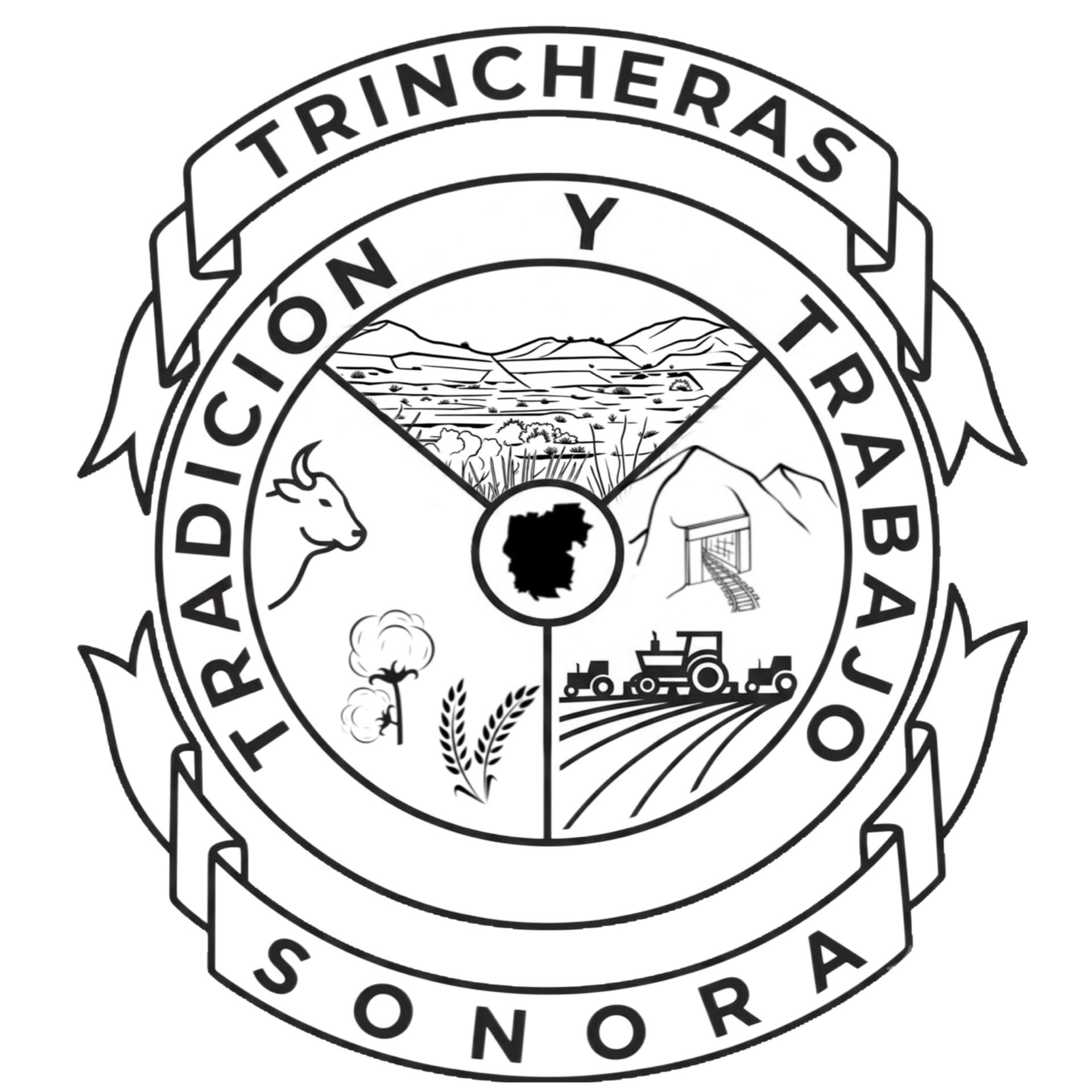 Escudo de armas del municipio de Trincheras